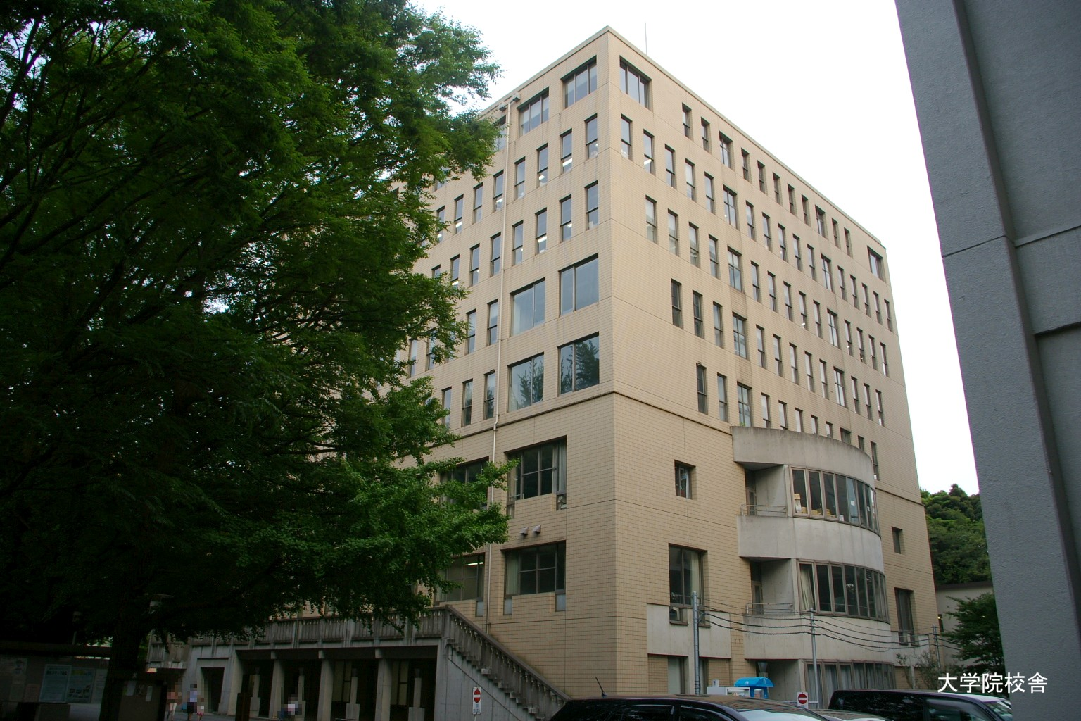 2009.5日本国内で塾生 (talk)が撮影。